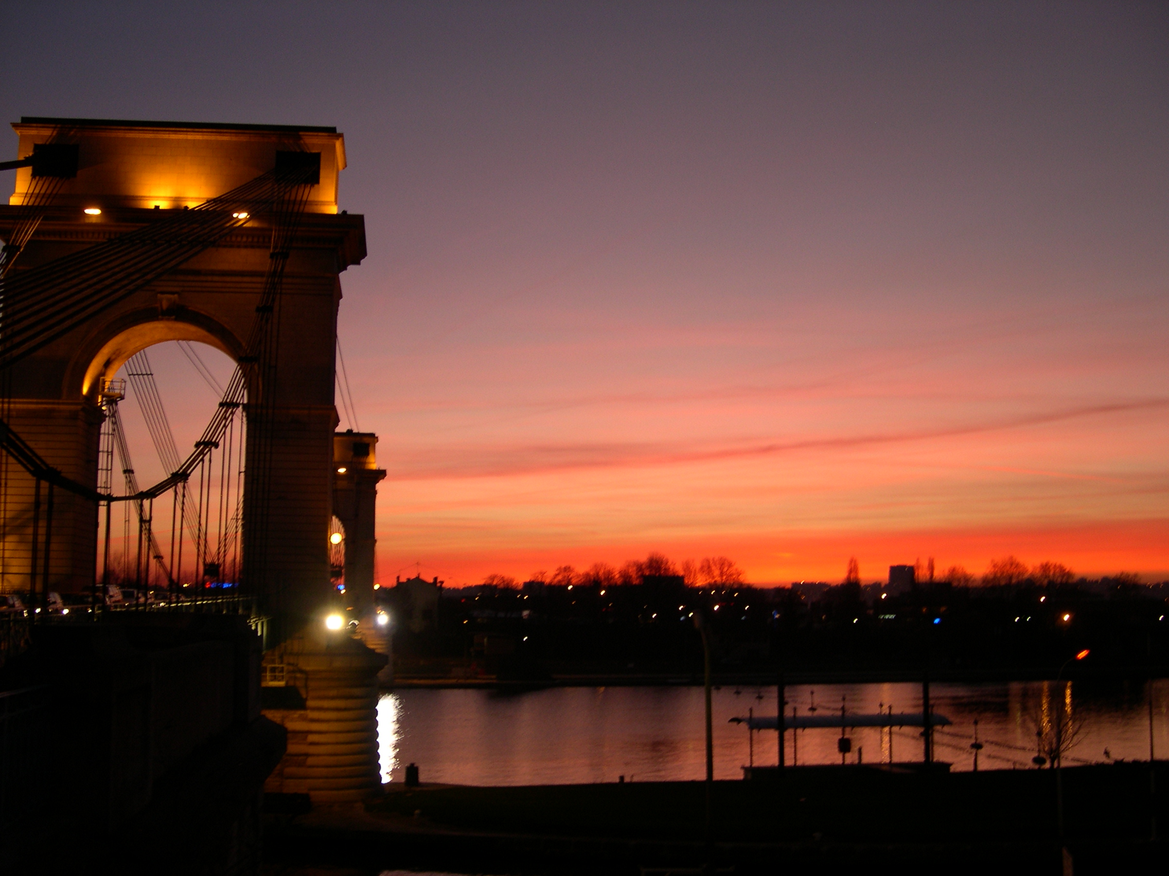 Ce pont construit au début du XXe siècle, relie Alfortville (rive droite de la Seine) à Vitry-sur-Seine (rive gauche). La photo est prise du côté Alfortville.